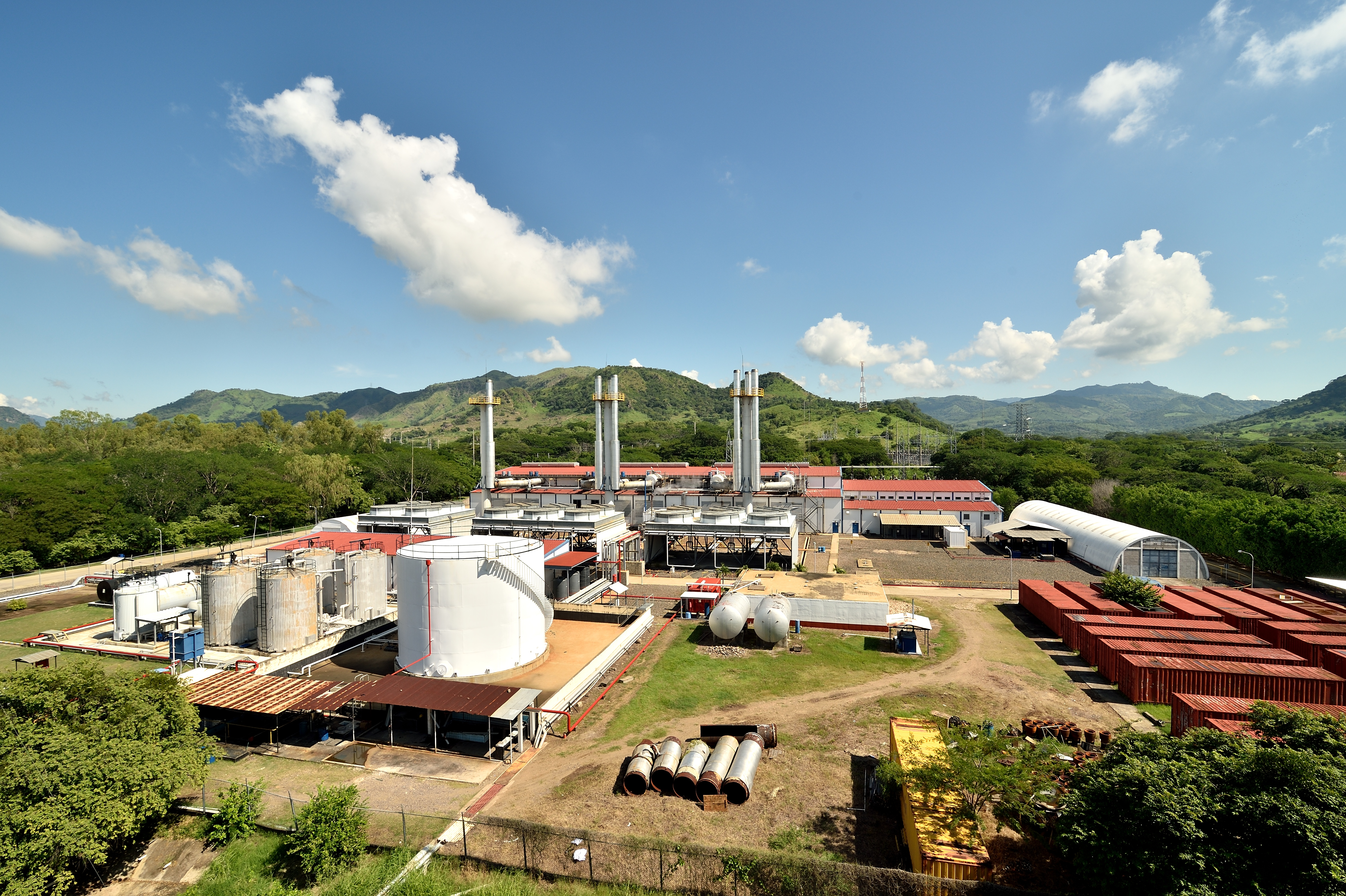 Planta eléctrica Pavana II en Honduras, con una capacidad instalada de 82 MW